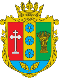 Герб Ємільчинського району